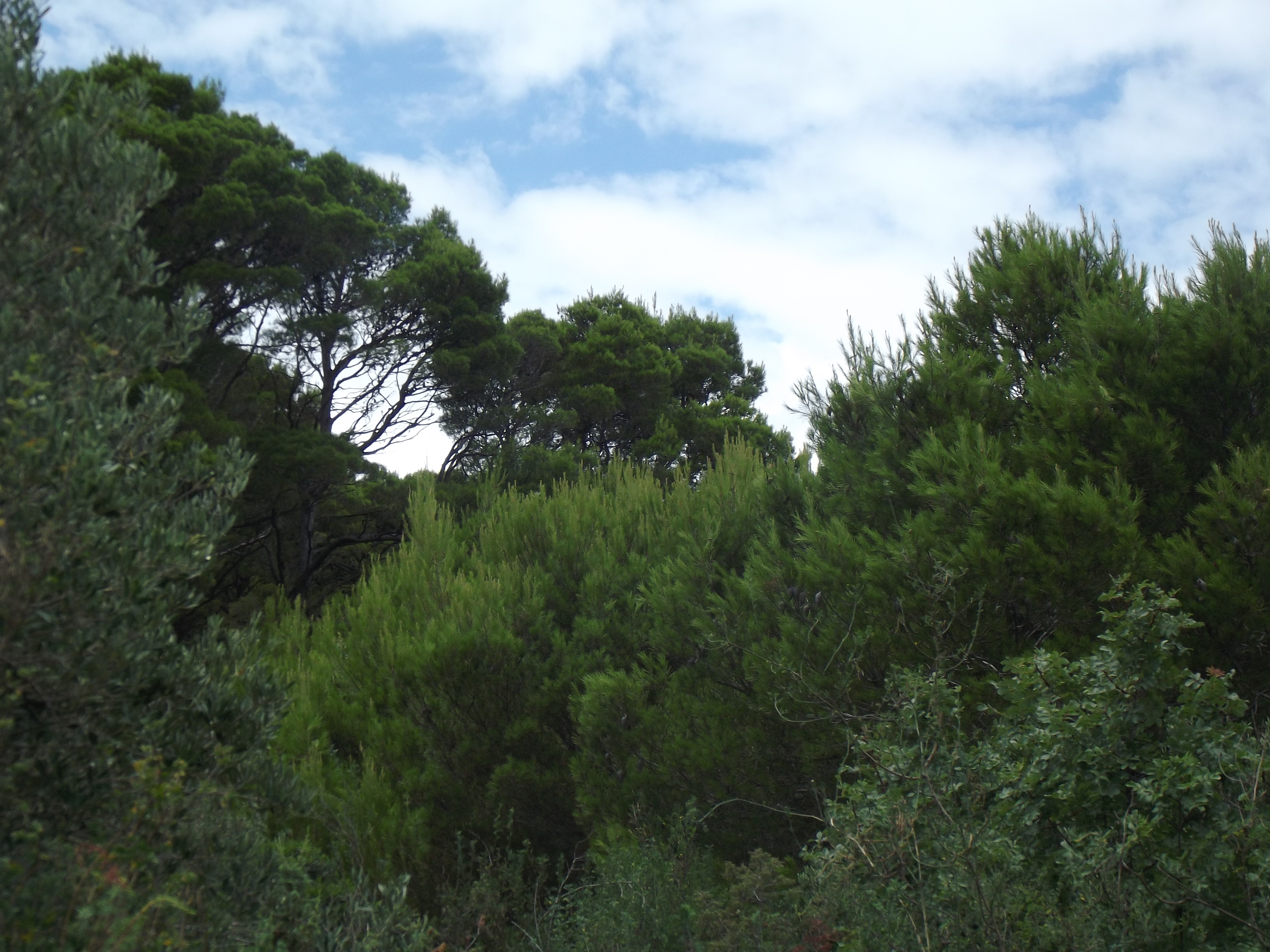 Macchia növényzet a horvát Pašman szigeten.